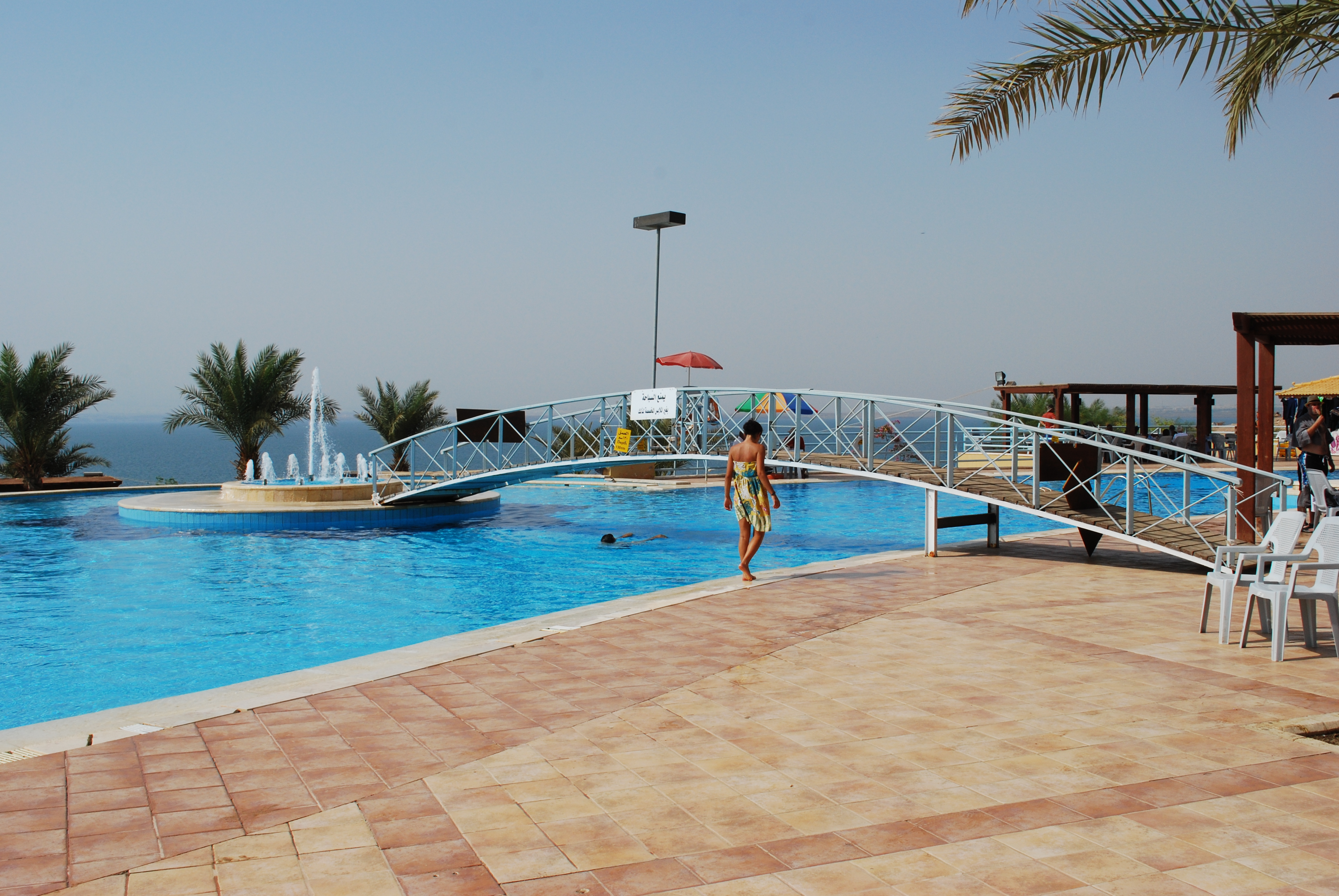 "Amman Beach Tourism Resort" sur la Mer Morte en Jordanie.